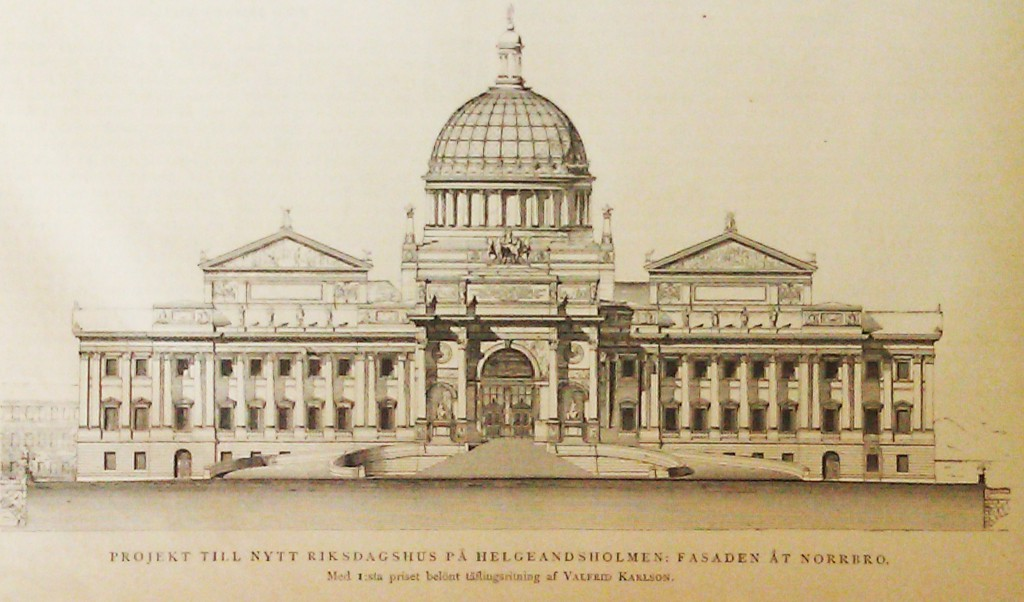 Förslag till nytt Riksdagshus av Valfrid Karlson